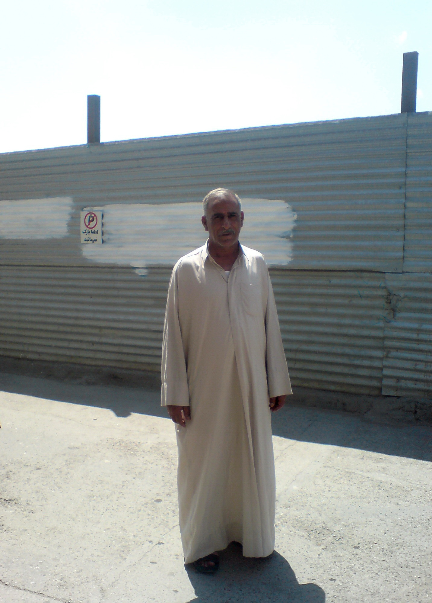 Iraqi Arab Men in Nishapur-Khorasan.